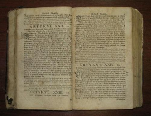 Музей: Баранавіцкі краязнаўчы музей Тып: пісьмовыя крыніцы Від: друкаваныя выданні Прадметнае імя: Статут Вялікага Княства Літоўскага Калектыўныя аўтары: Друкарня Акадэмічная; Матэрыялы: папера; кардон; скура; Тэхналогіі стварэння: друк; Дата стварэння: 1694 г. Месца стварэння: Вялікае Княства Літоўскае, г. Вільня Памеры: 32х20х5,9 см